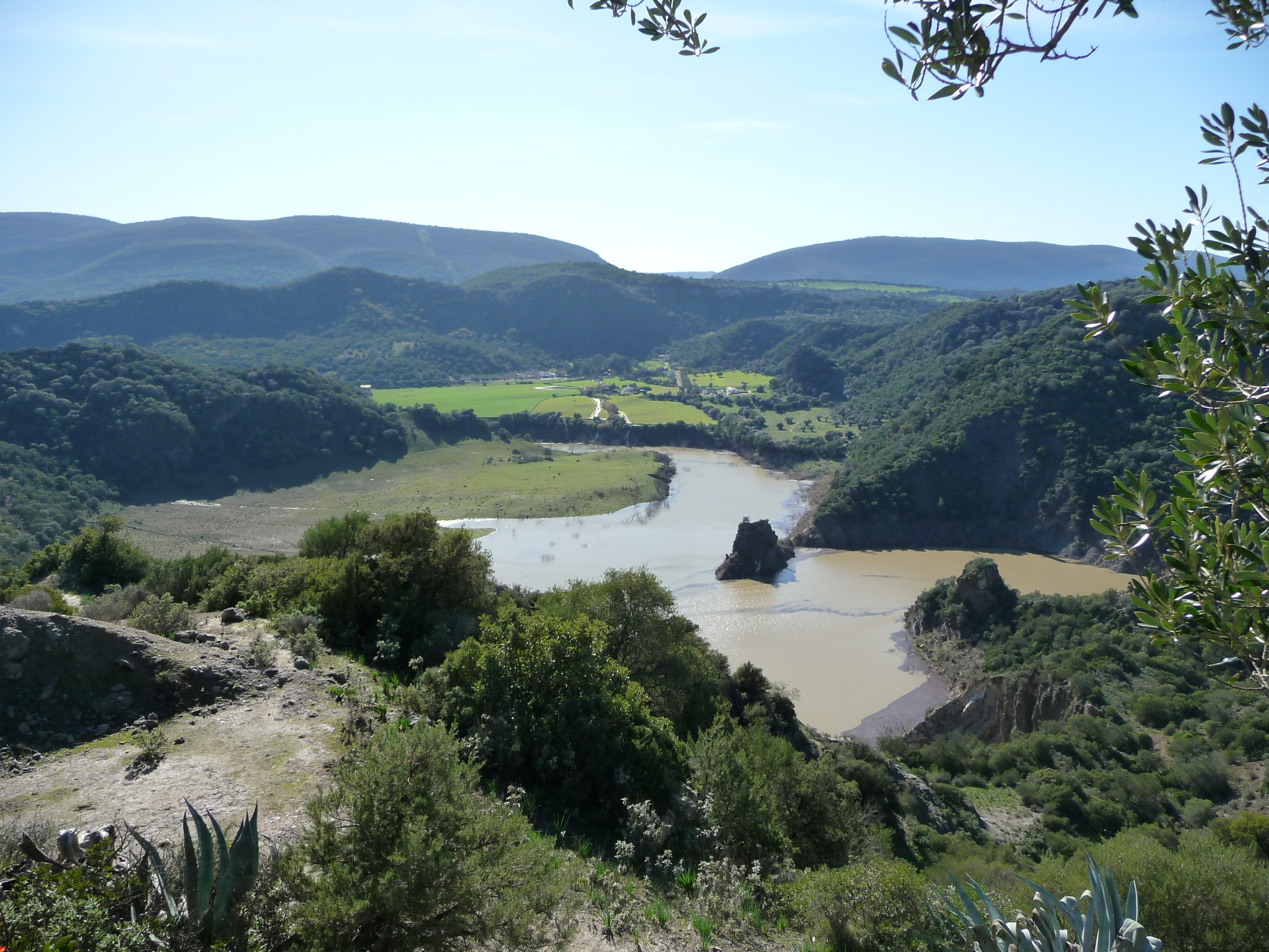 TajoDelAguila-P1060322.JPG